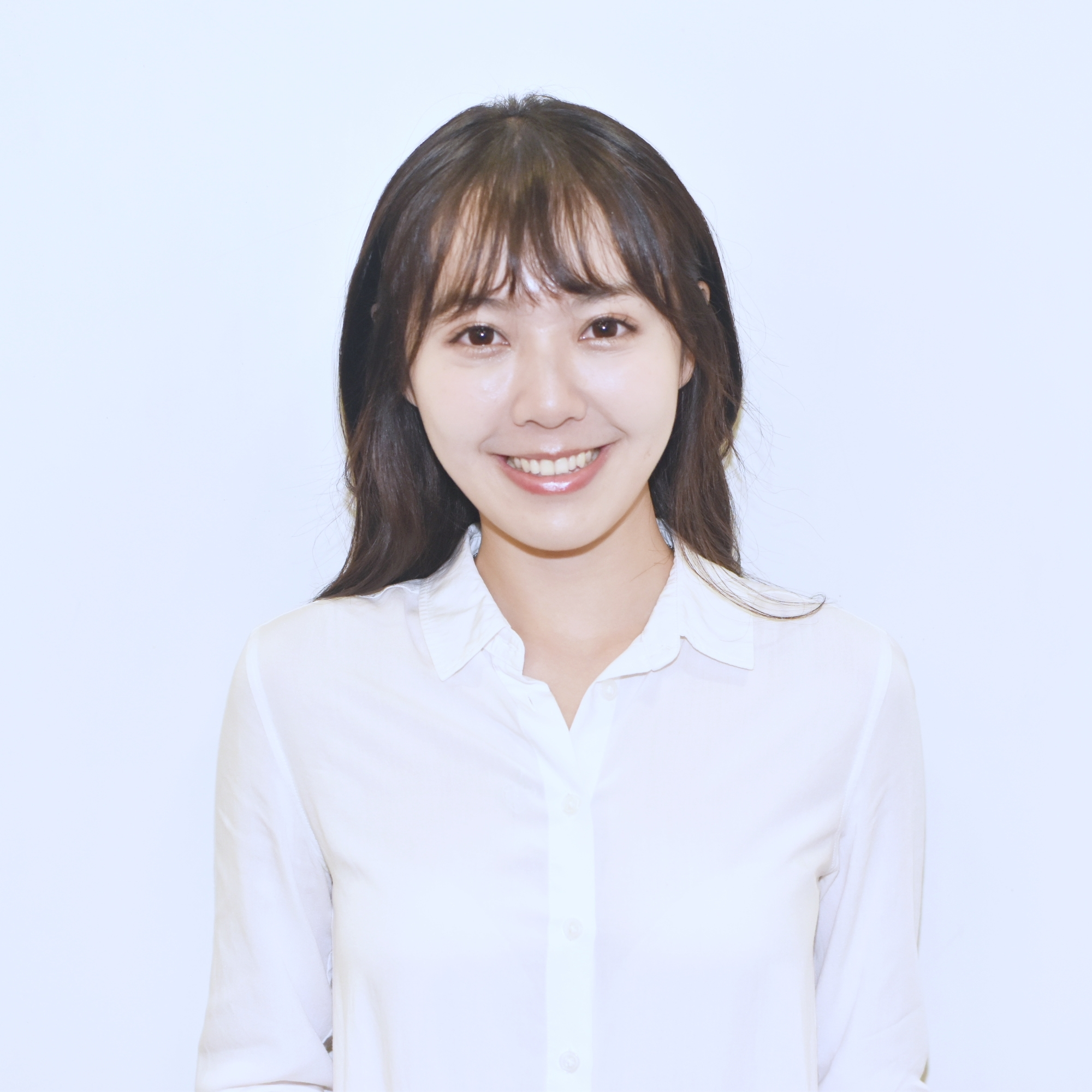 中文（台灣）: 9月22日台北世貿一館美容化妝品展-秋季展時，張婕筠出席主持活動拍攝